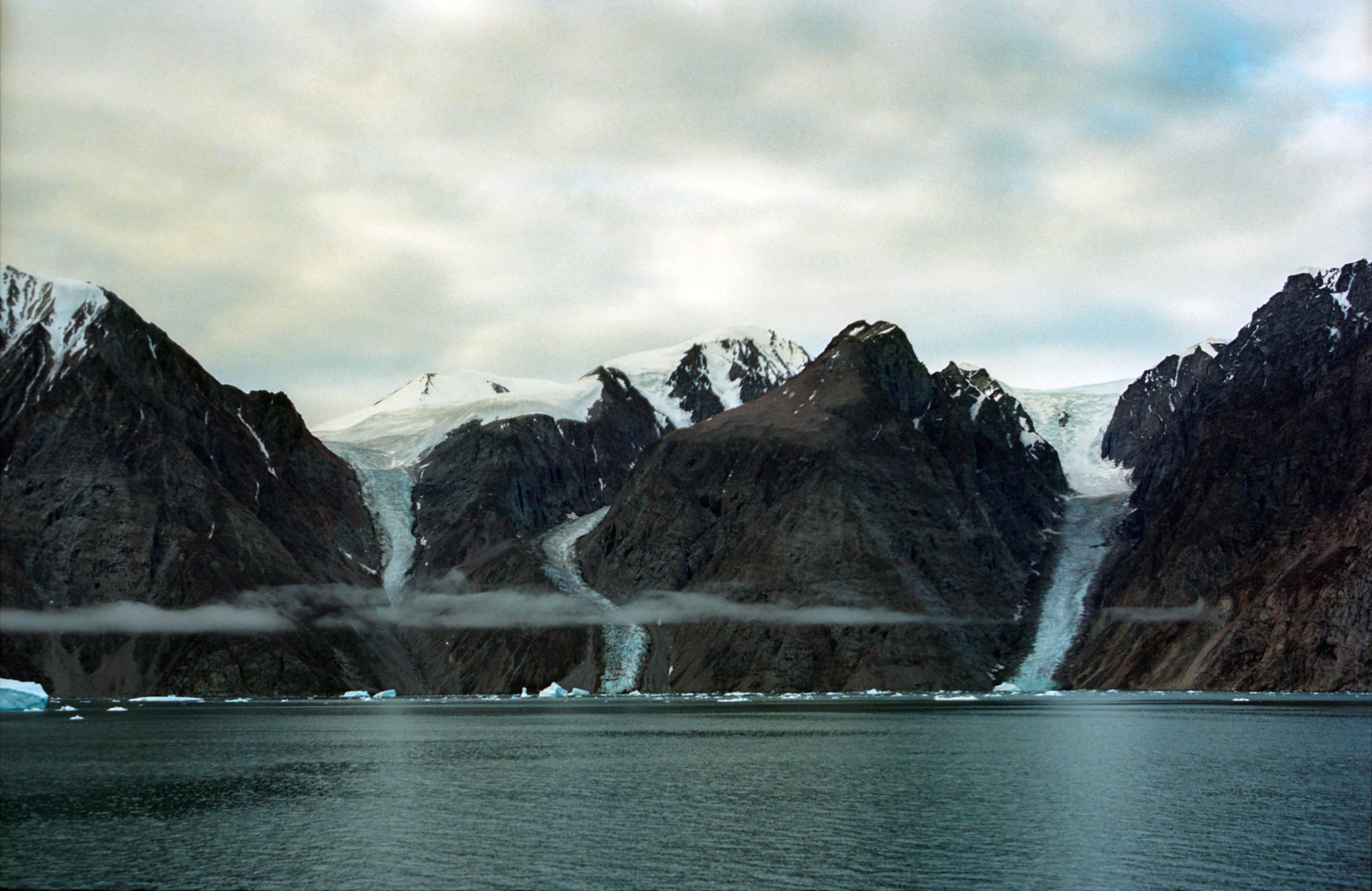 Franz Josef Fjord, gacier tongues